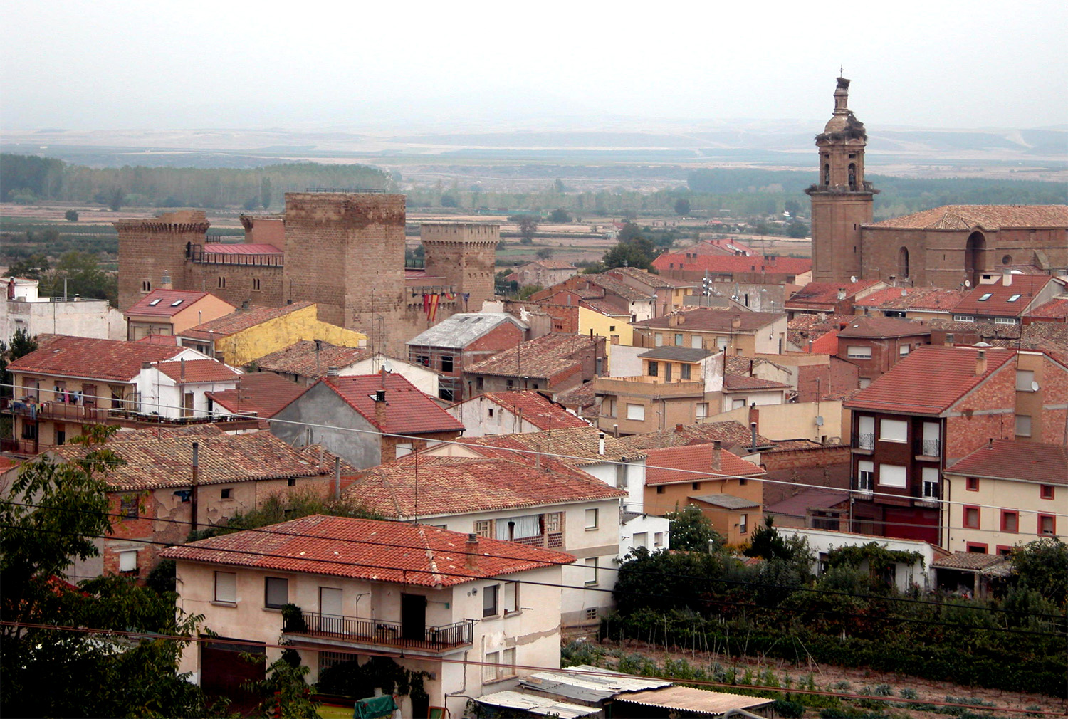 AGONCILLO. Panorámica del pueblo.